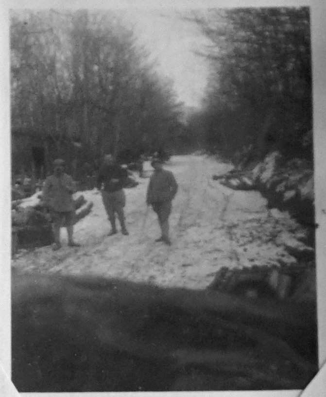 sur une photographie de la 1 guerre mondiale.